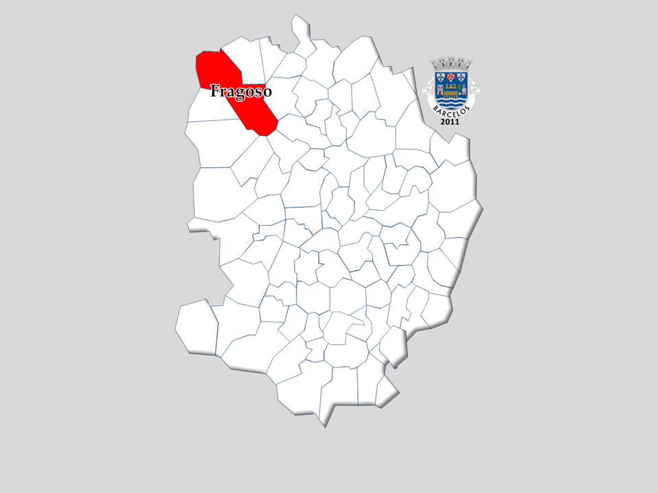 anos1864/2011